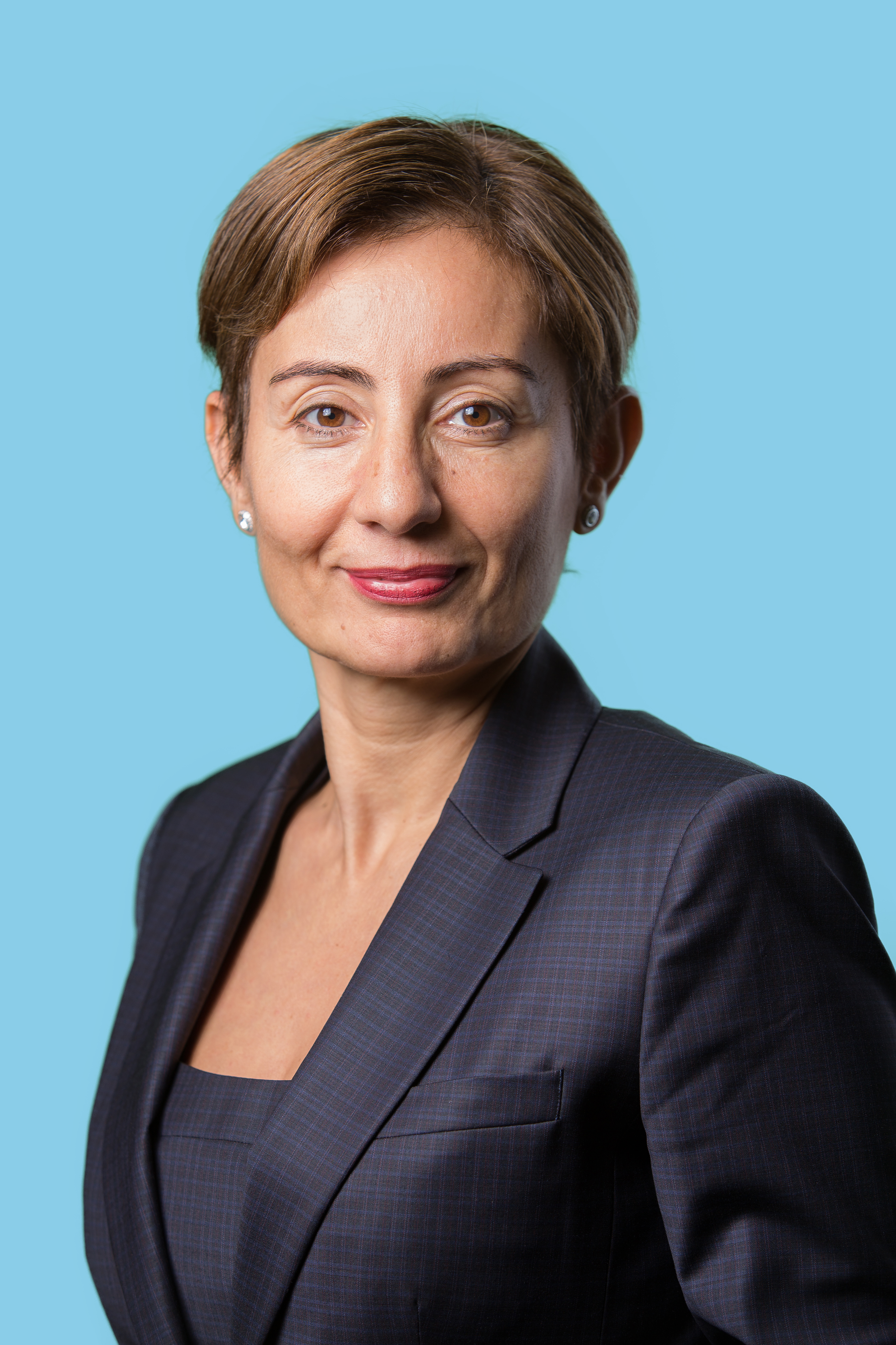 22 november 2016. Tweede Kamerlid voor de Partij van de Arbeid. Foto: Lex Draijer.